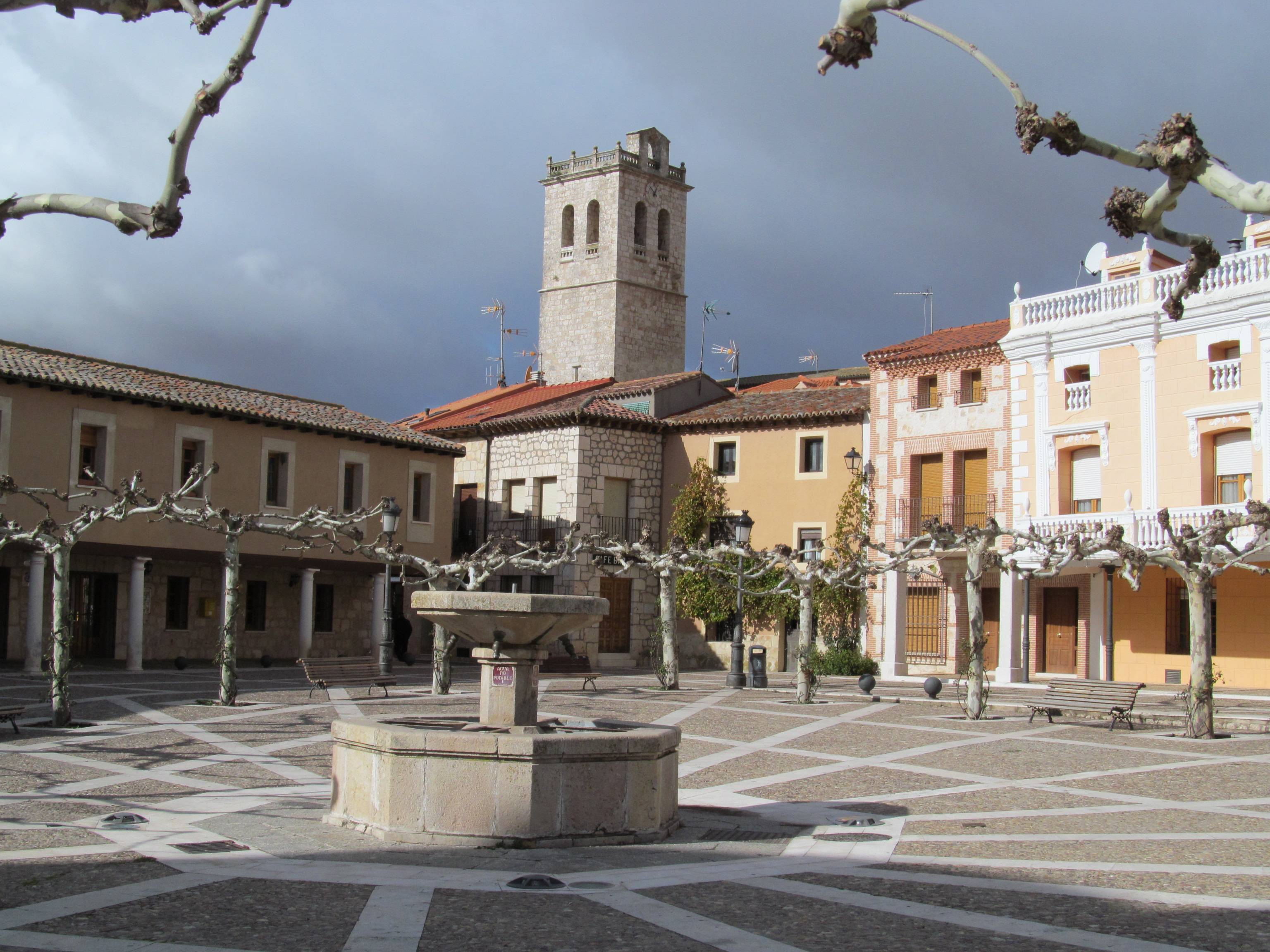 Torija.La Plaza de la Villa.